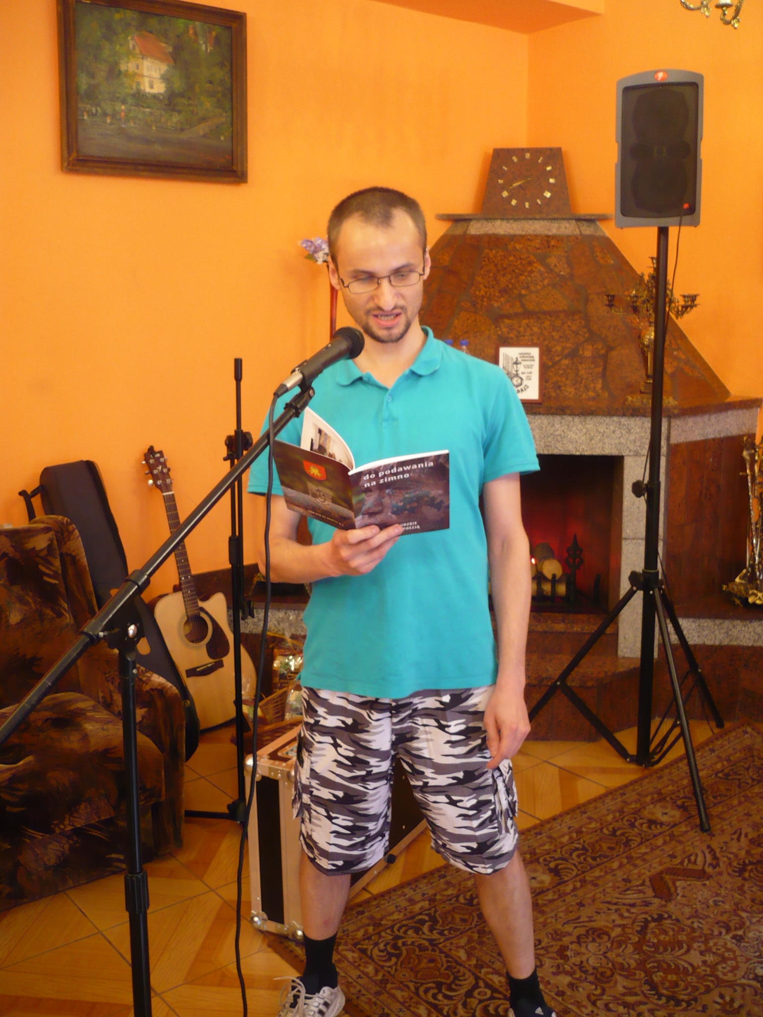 Tomasz Smogór